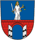 Znak obce Křinec